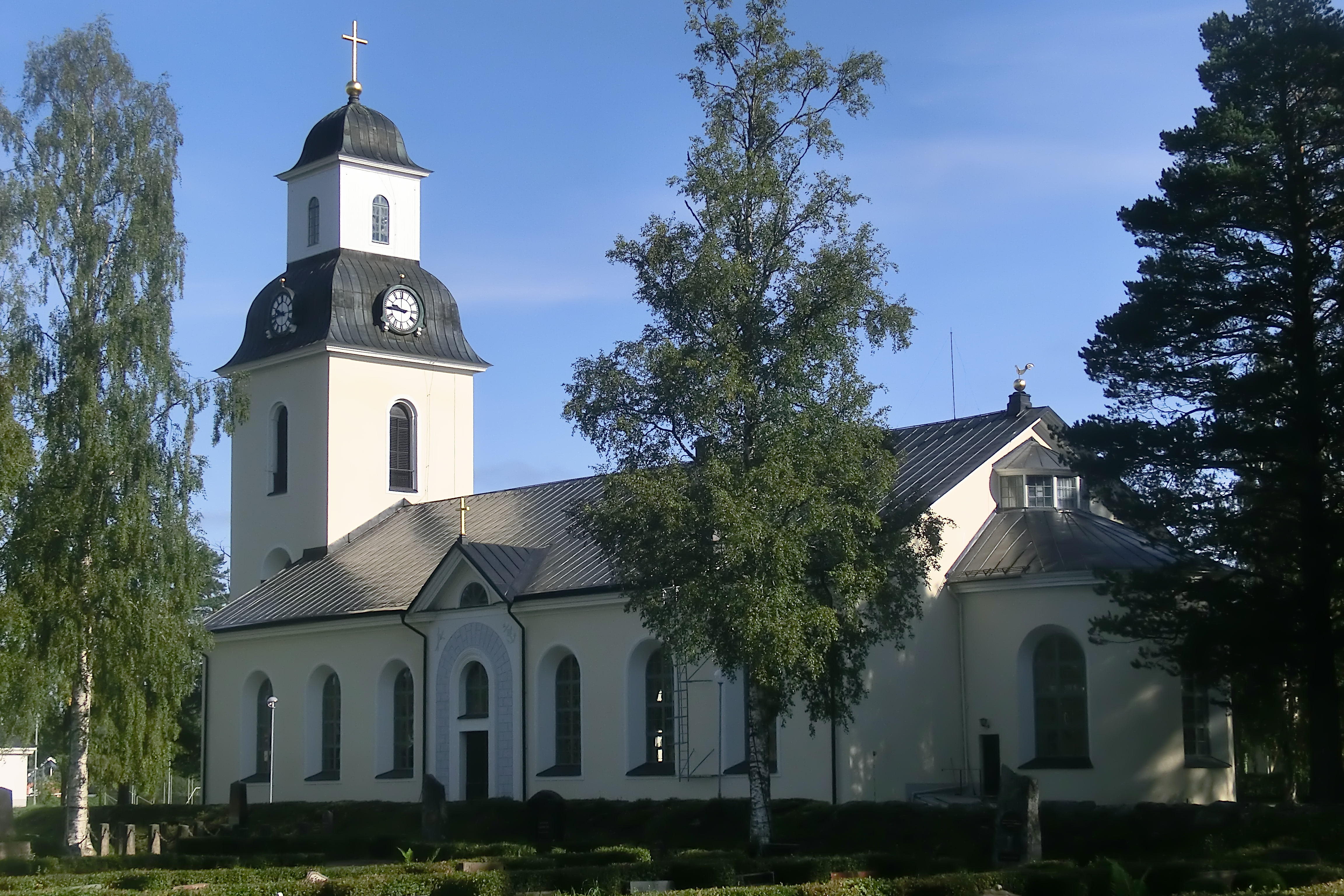 Ramsele nya kyrka